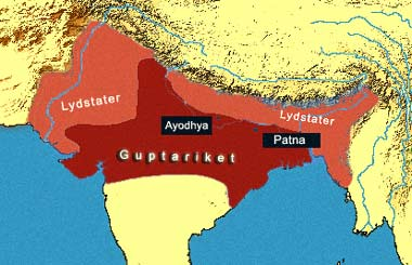 Indien, karta, Guptariket, egentillv.